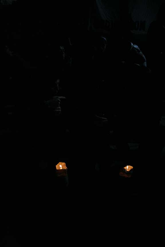 Interior de la Escotilla Nº8. Estadio Nacional. Chile.